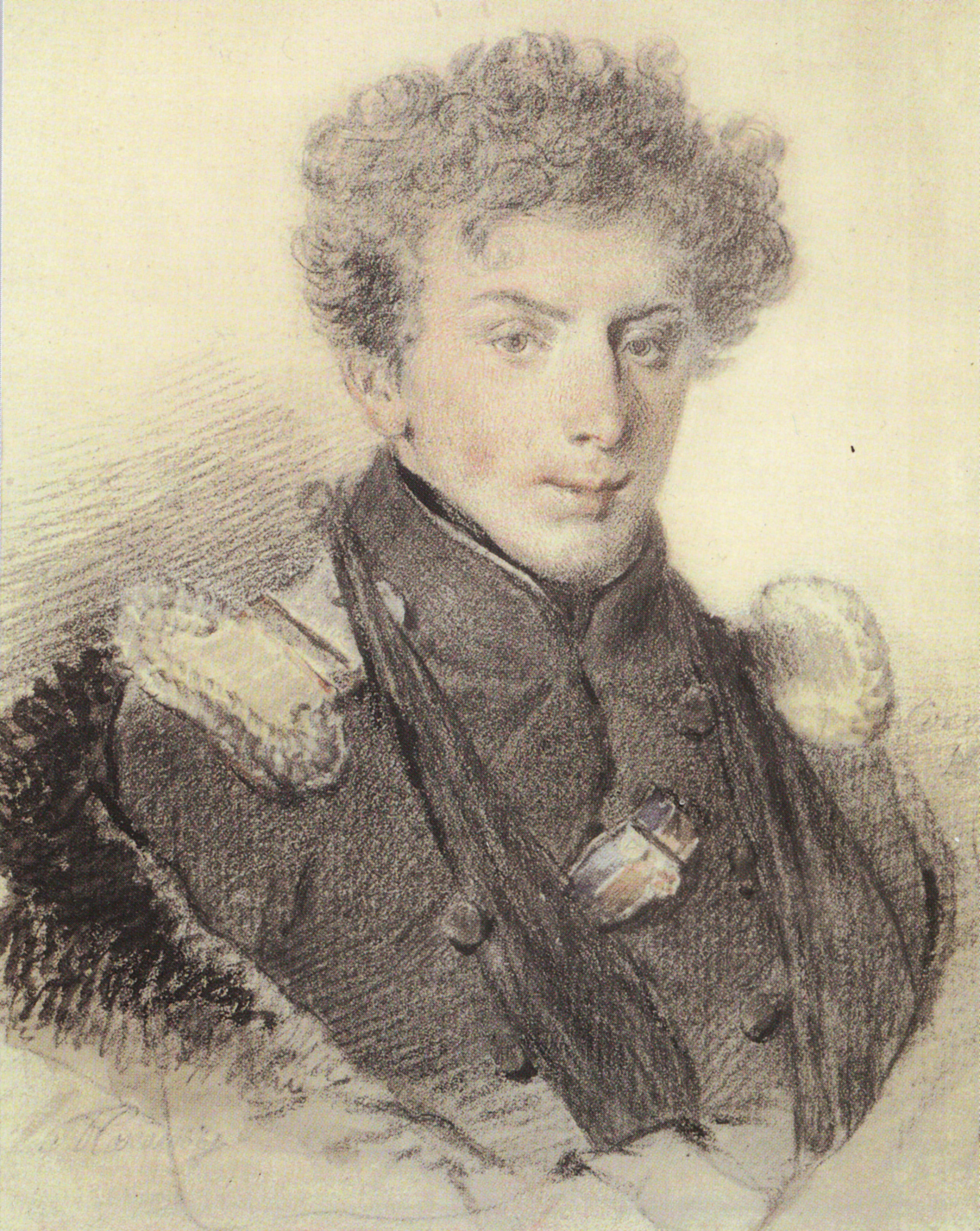 П.Ф. Соколов. Портрет А.А. Полторацкого.1814. Бумага, итальянский карандаш, акварель сангина. ГЛМ